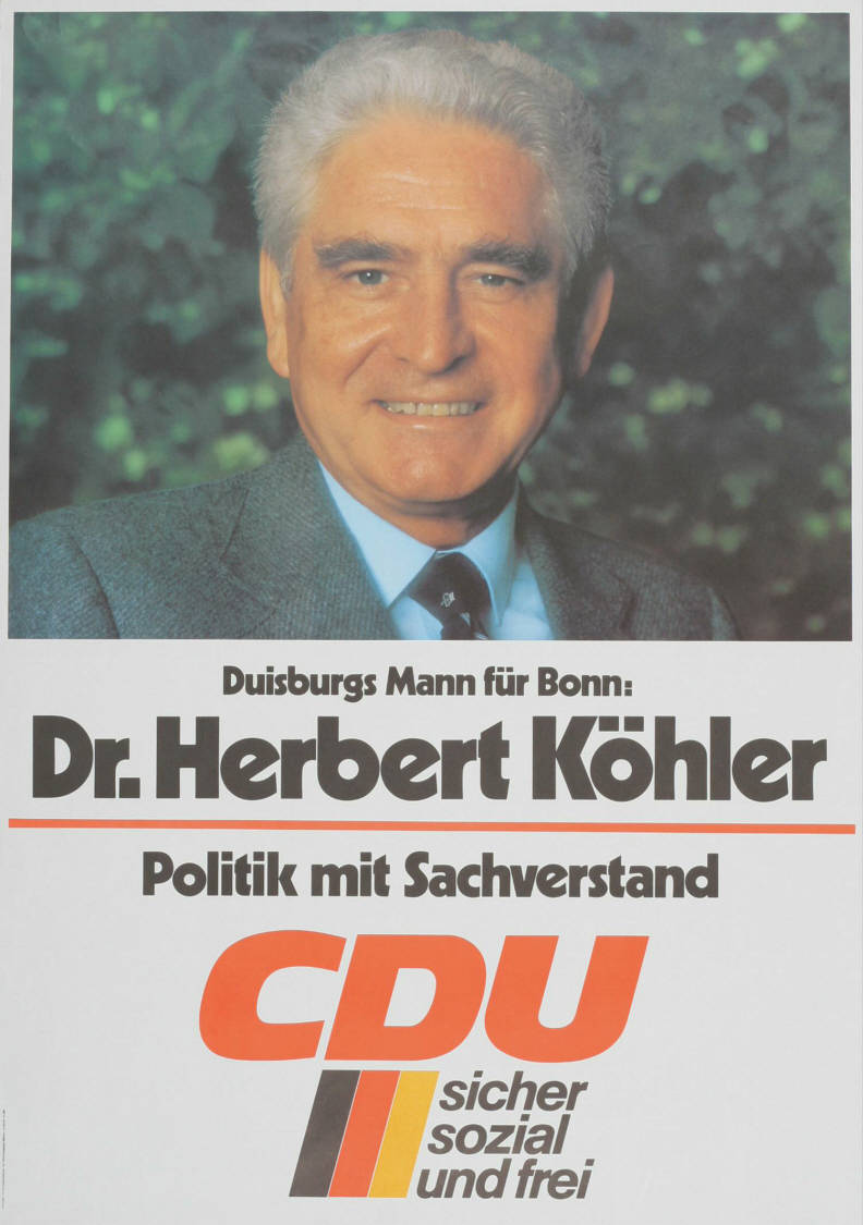 Duisburgs Mann für Bonn: Dr. Herbert Köhler Politik mit Sachverstand CDU sicher sozial und frei Abbildung: Porträtfoto Plakatart: Kandidaten-/Personenplakat mit Porträt Auftraggeber: CDU-Bundesgeschäftsstelle, Abt. Öffentlichkeitsarbeit, Bonn Objekt-Signatur: 10-001: 2431 Bestand: Plakate zu Bundestagswahlen (10-001) GliederungBestand10-18: Plakate zu Bundestagswahlen (10-001) » Die 9. Bundestagswahl am 5. Oktober 1980 » CDU » Mit Porträtfoto Lizenz: KAS/ACDP 10-001: 2431 CC-BY-SA 3.0 DE